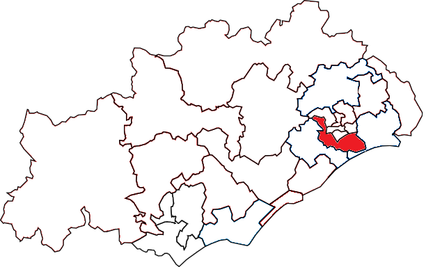 Situation du canton dans le département de l'Hérault